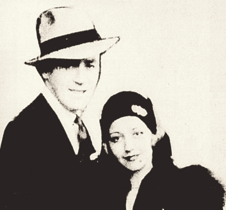 O roteirista russo-americano Sy Bartlett e sua então esposa, a atriz Alice White, em 1931.